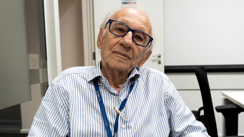 Andor em fotografia para o blogue Aventuras na História